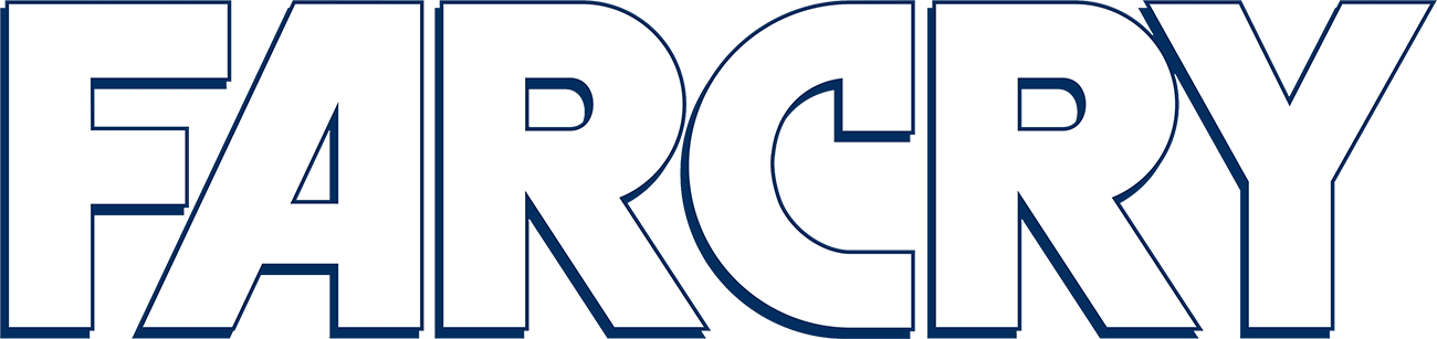 Логотип серии игр Far Cry